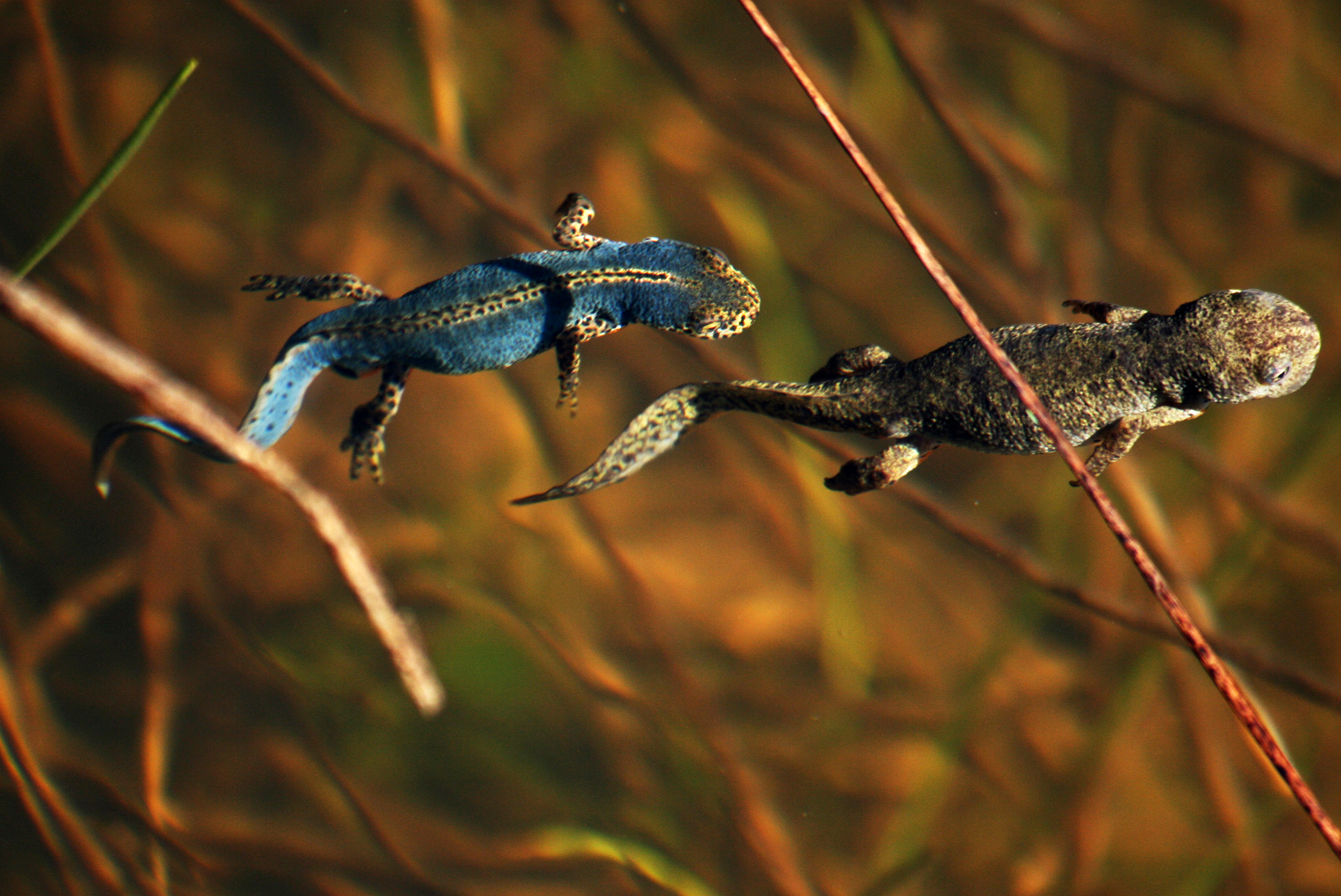 Αλπικοί τρίτωνες σε λίμνη στο οροπέδιο της Οίτης This is a photography of Natura 2000 protected area with ID GR2440004